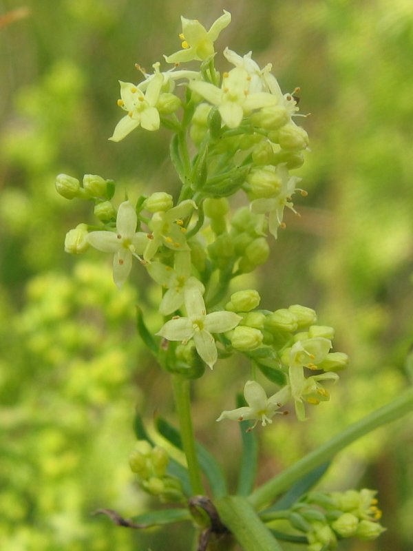 Gelweißes Labkraut Galium x pomeranicum, Zingst